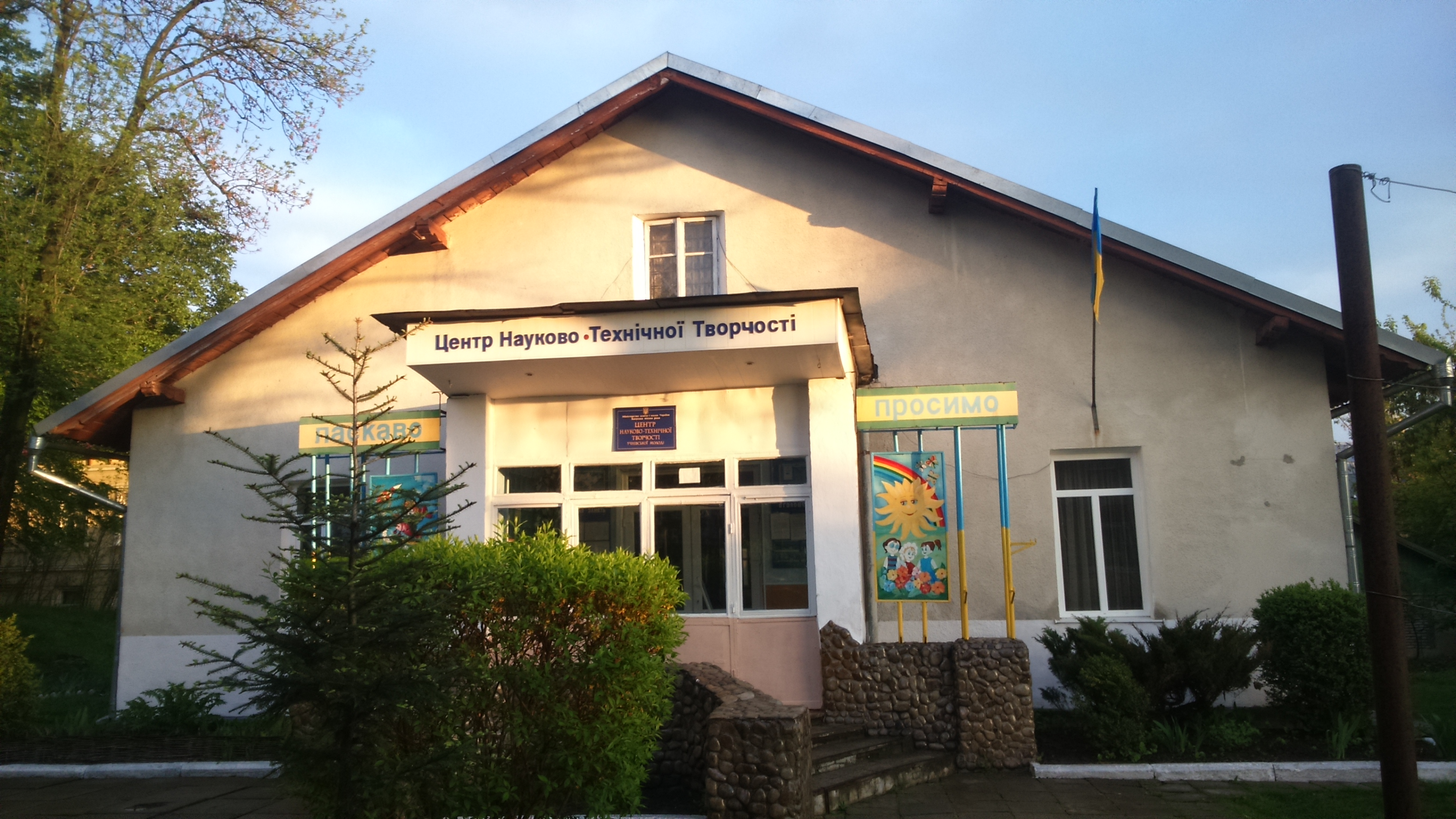 Центр науково-технічної творчості учнівської молоді